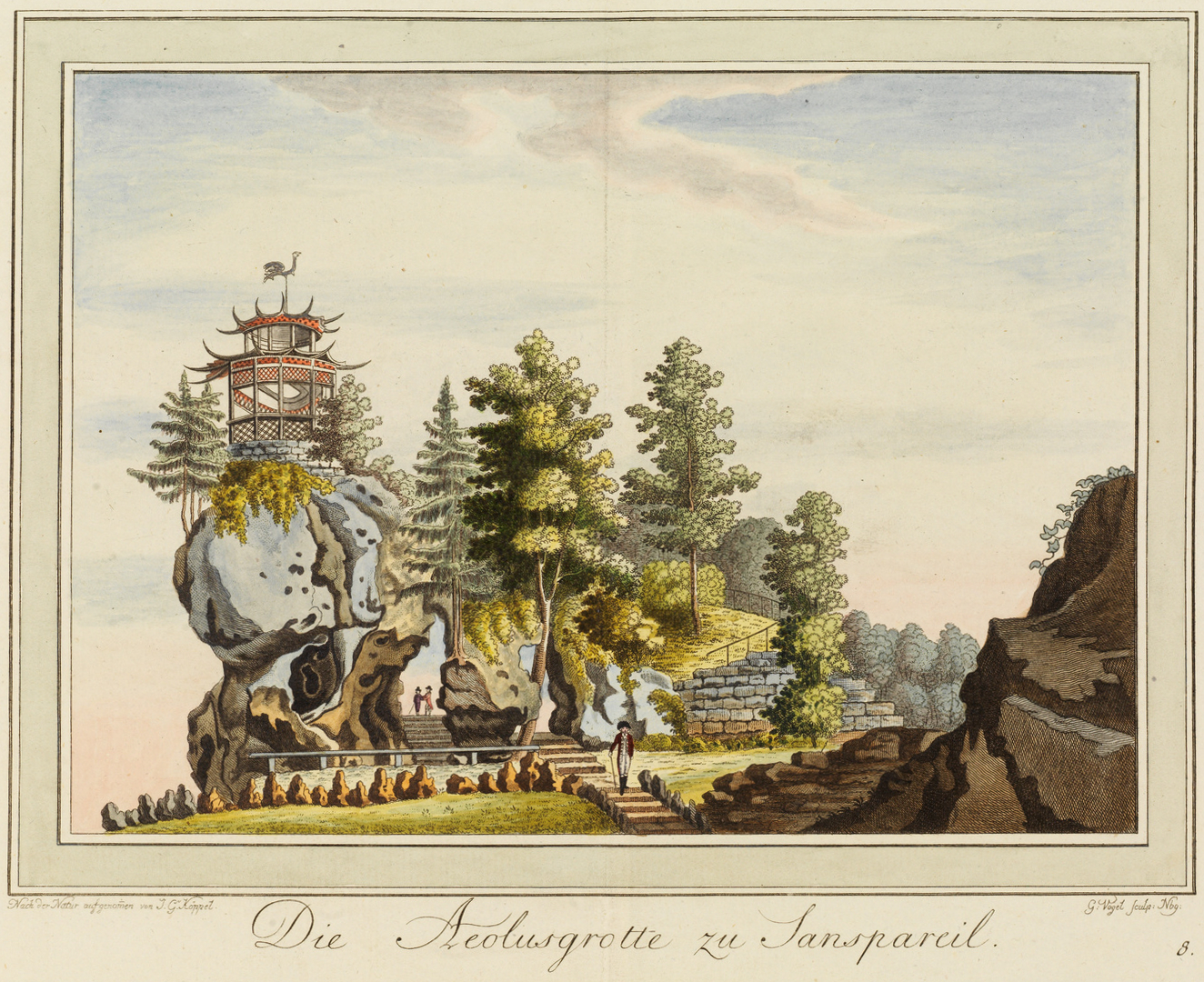 Von G. Vogel gestochene Zeichnung von Johann Gottfried Köppel aus dem Buch Die Eremitage zu Sanspareil. Nach der Natur gezeichnet und beschrieben von Johann Gottfried Köppel. Kais. Landgerichts-Registrator zu Anspach. Erlangen. Verlegt von Wolfgang Walther. 1793.